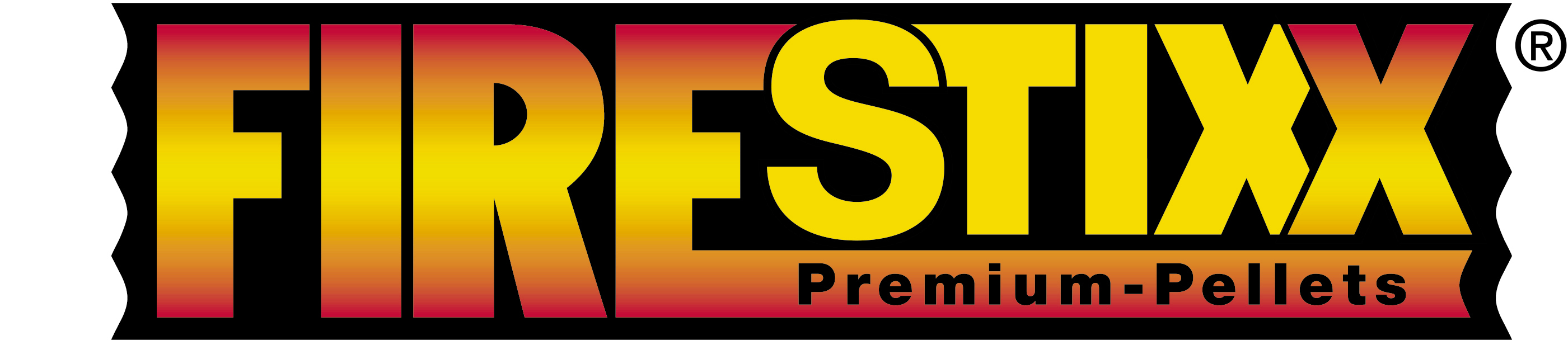 FireStixx